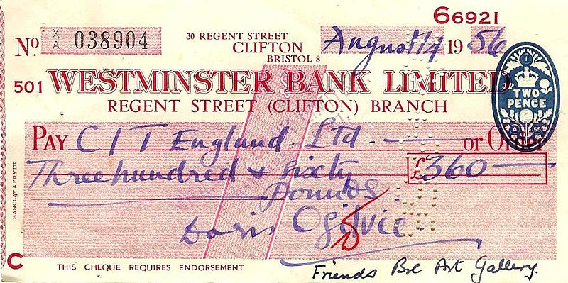 Прецртани чек - облик или вертикалне линије у центру обрасца